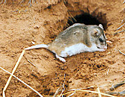 Onychomys leucogaster von Public Domain